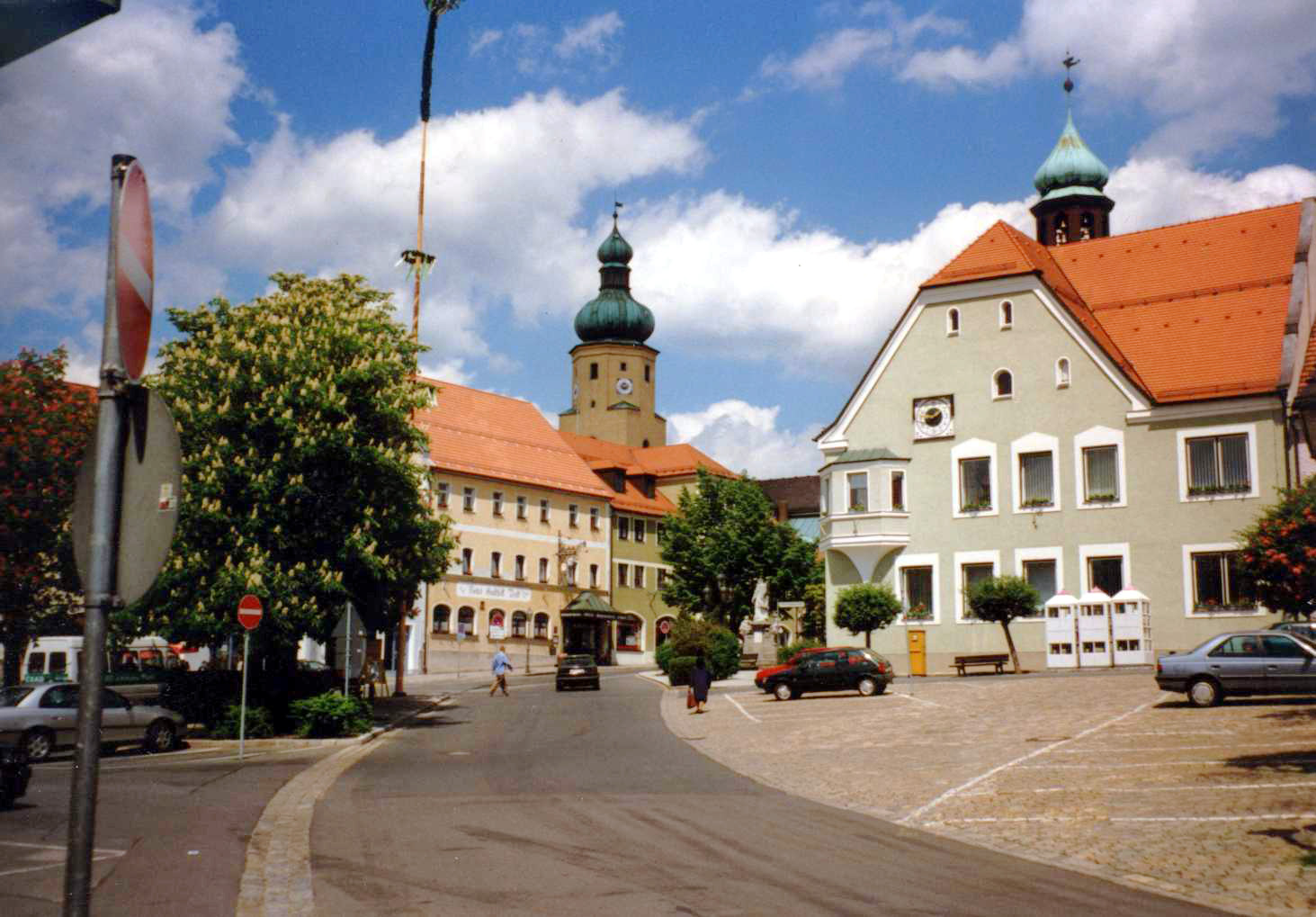 Der Marktplatz in Waldmünchen 1997. Rechts das Rathaus, in der Mitte der Stadt- bzw. Kirchturm. Diese Aufnahme zeigt den alten Marktplatz vor der Umgestaltung 2004.